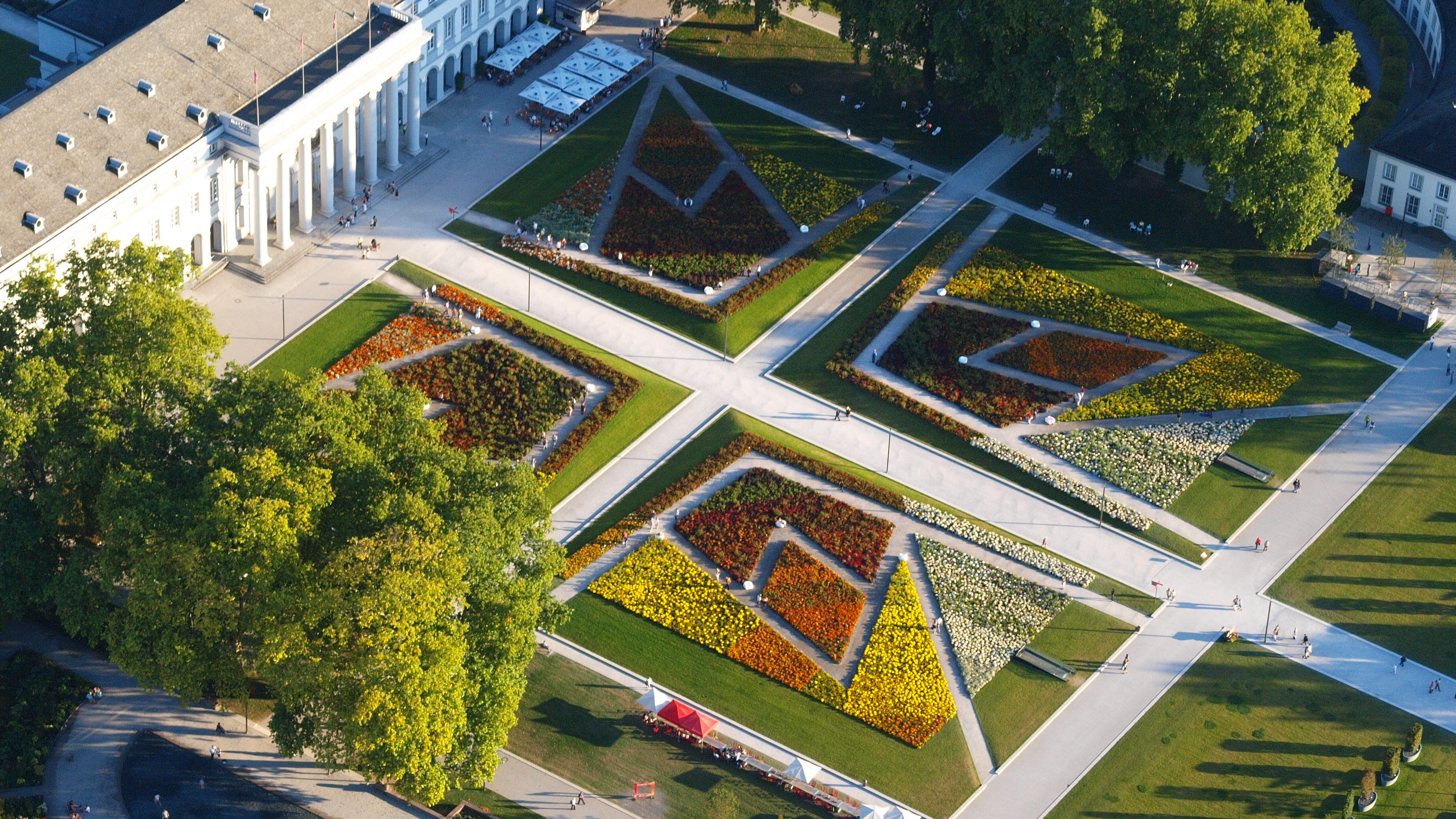 Kurfürstliches Schloss, Koblenz: Vorplatz, Luftaufnahme